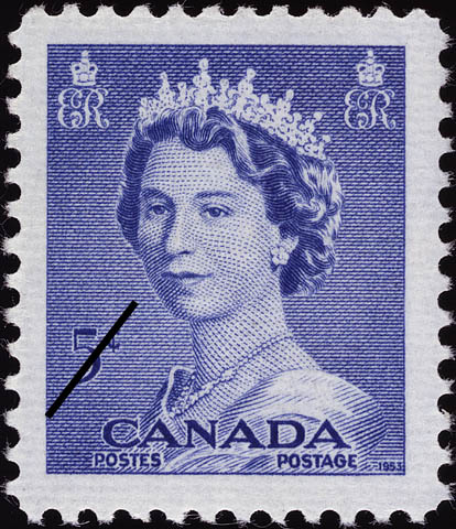 Timbre Poste Canada 5cents ElizabethII Karsh